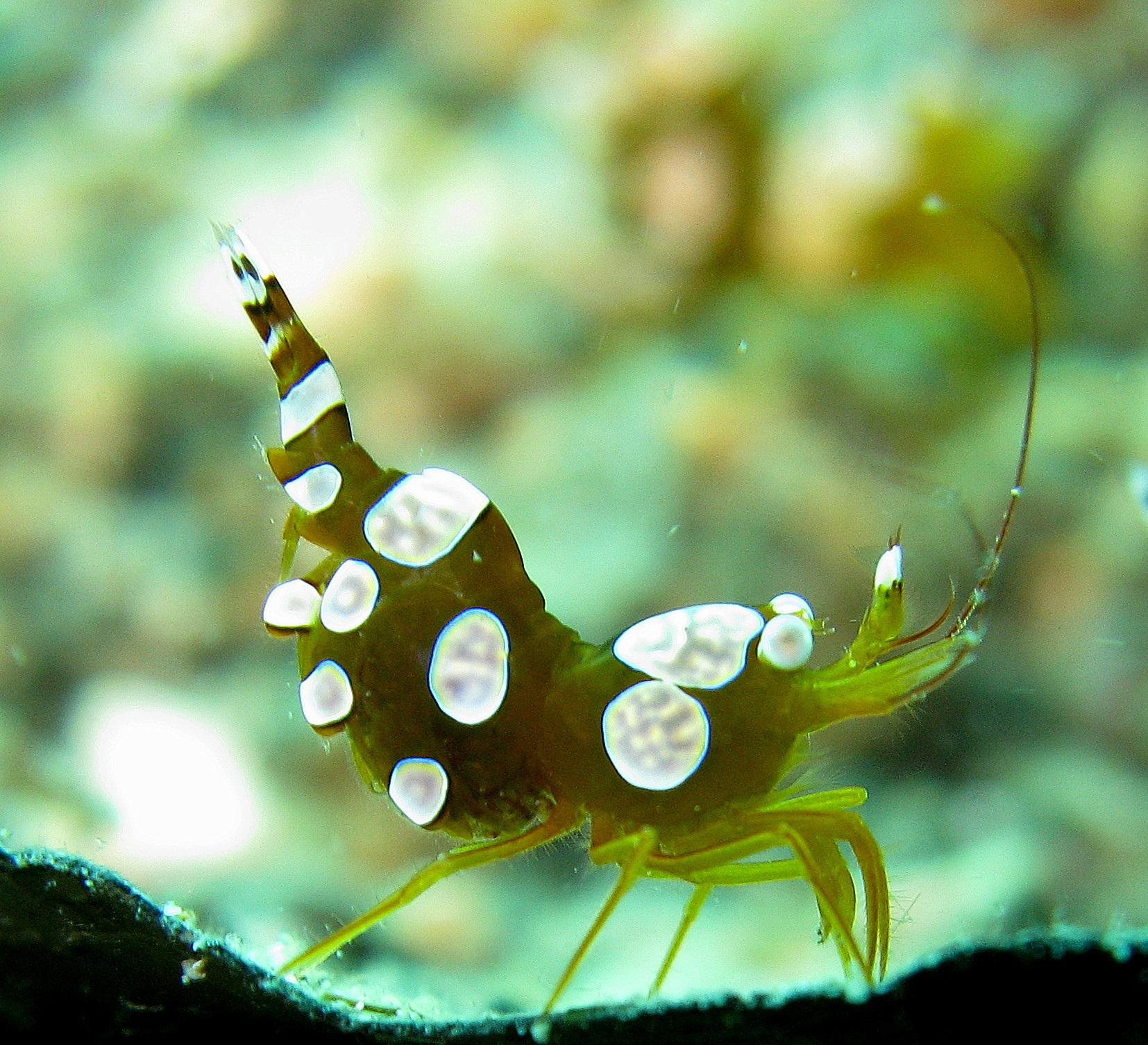 Thor amboinensis, Lembeh, Indonesia